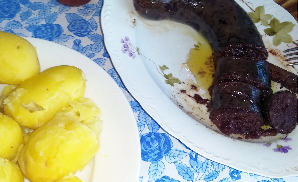 Mustardela (un salume tradizionale della Val Pellice) servita con patate bollite